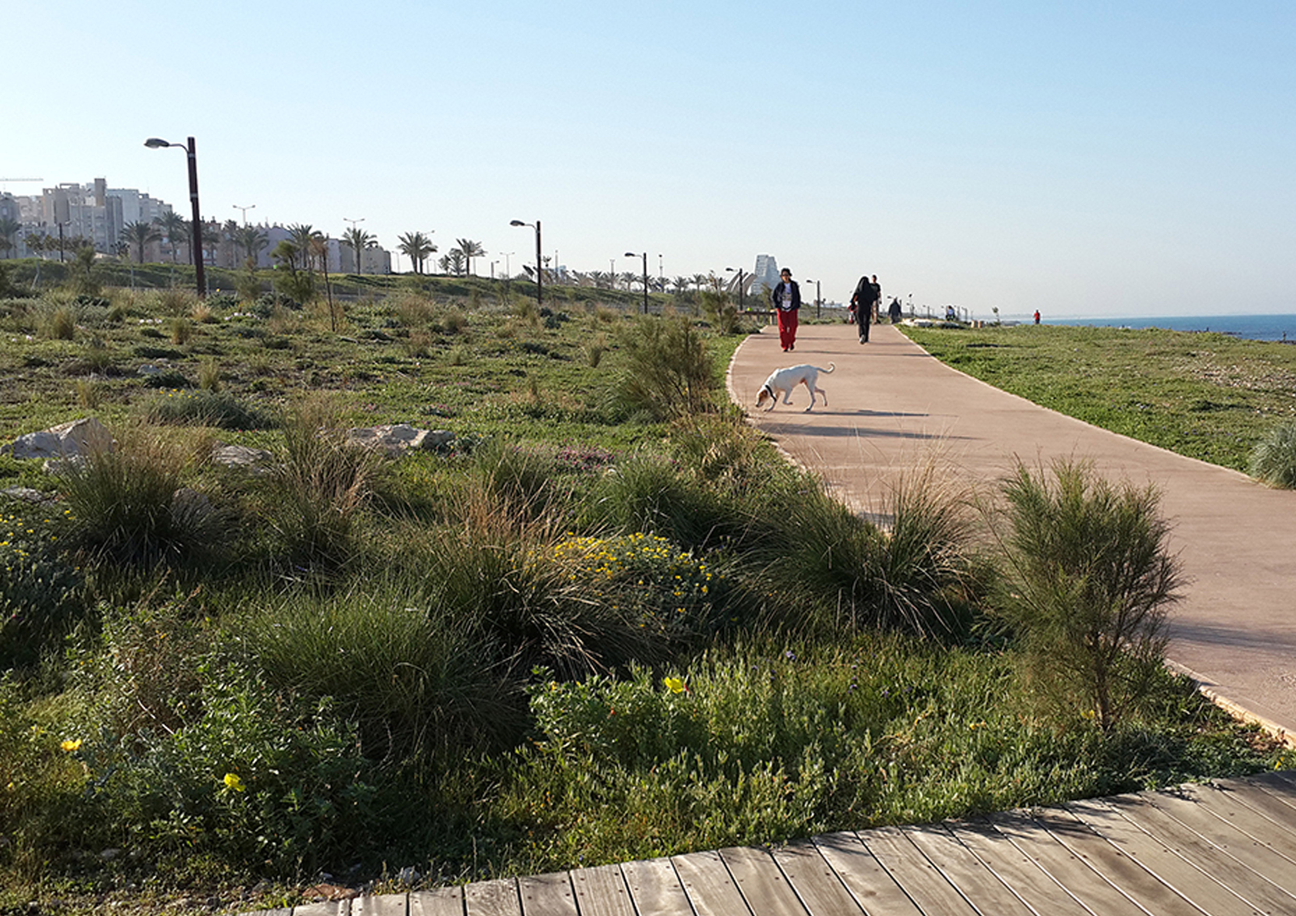 טיילת חוף שקמונה, חיפה